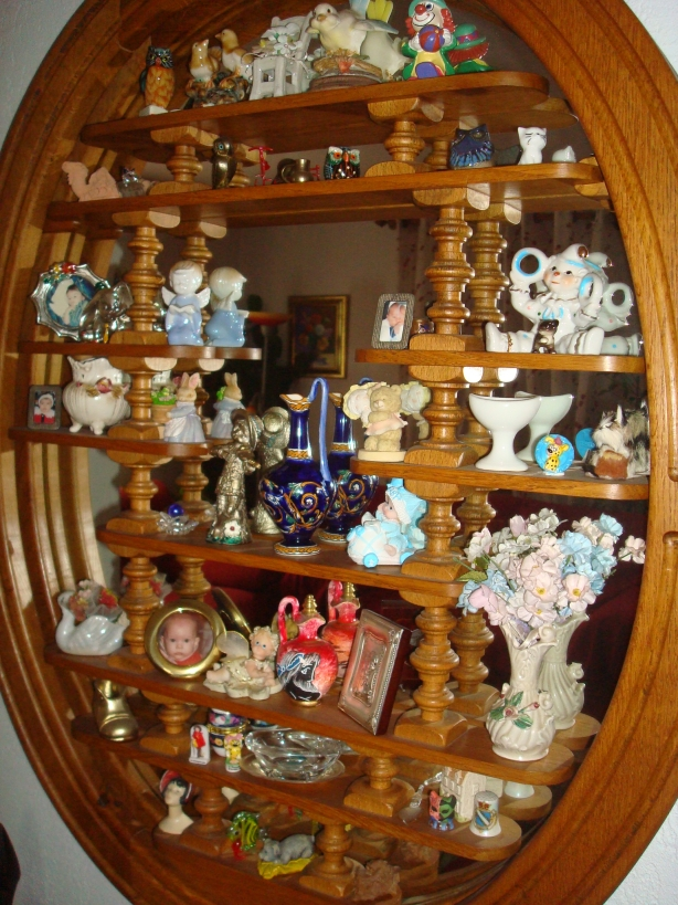 Présentoir de bonbonnières et statuettes accompagnant les dragées